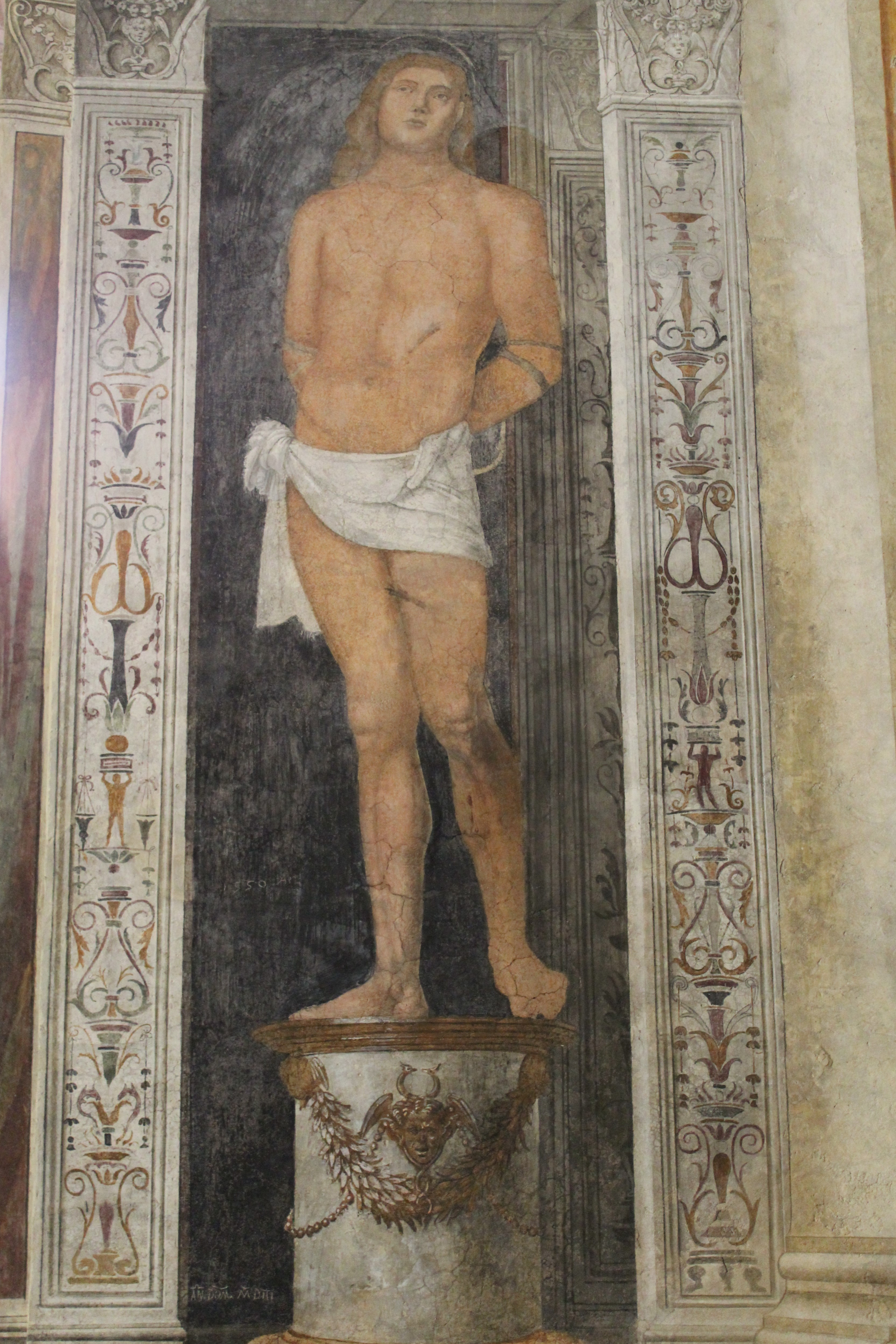 Cappella di San Biagio posta all'interno (braccio sinistro del transetto) della chiesa dei Santi Nazaro e Celso di Verona